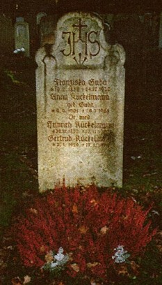 Waldfriedhof München-Gertrud Kückelmann